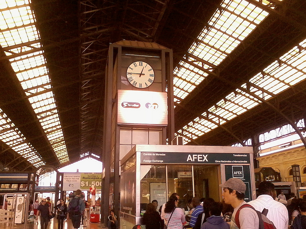 Ojalá todas las estaciones de EFE fueran así.